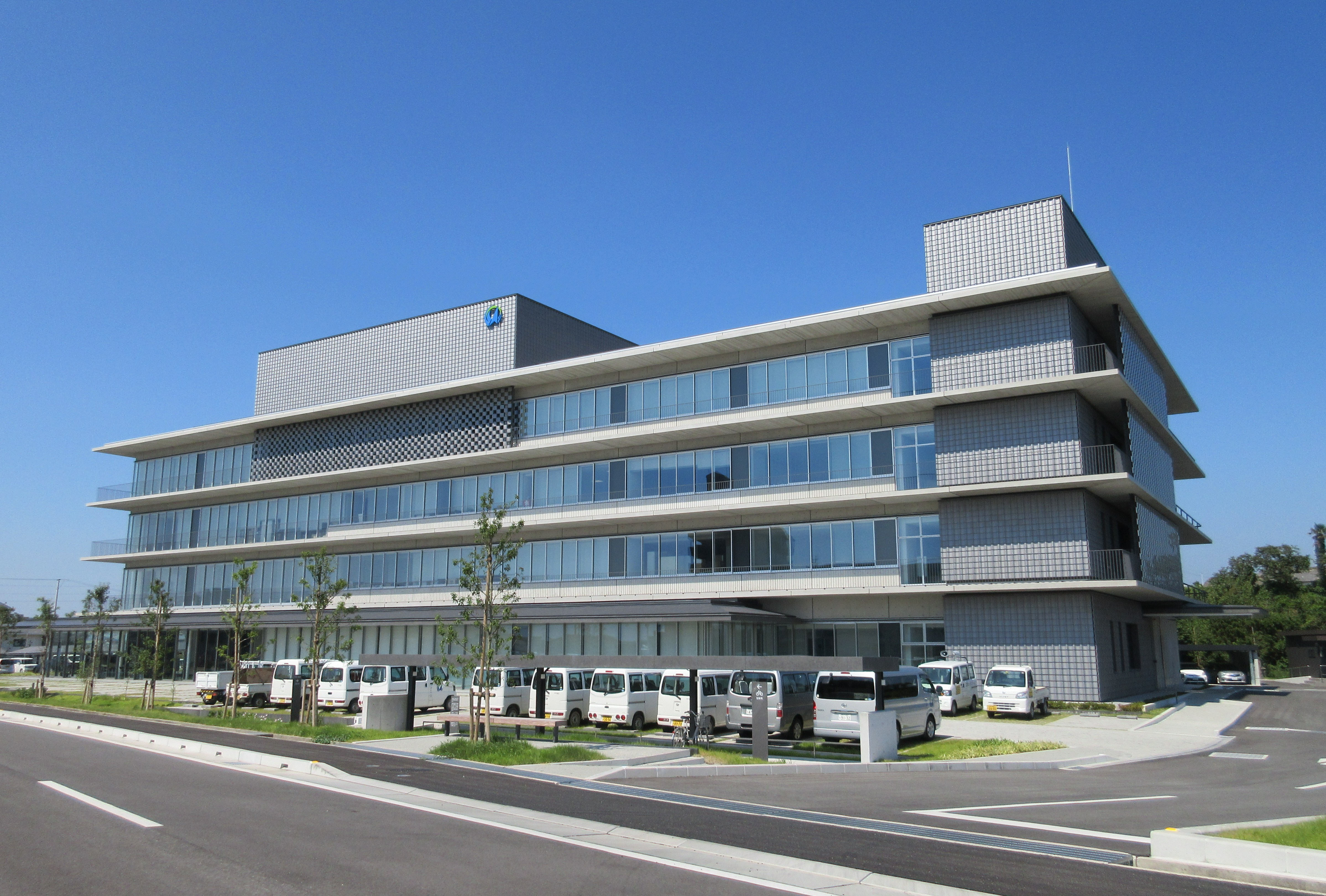 南あわじ市役所本館